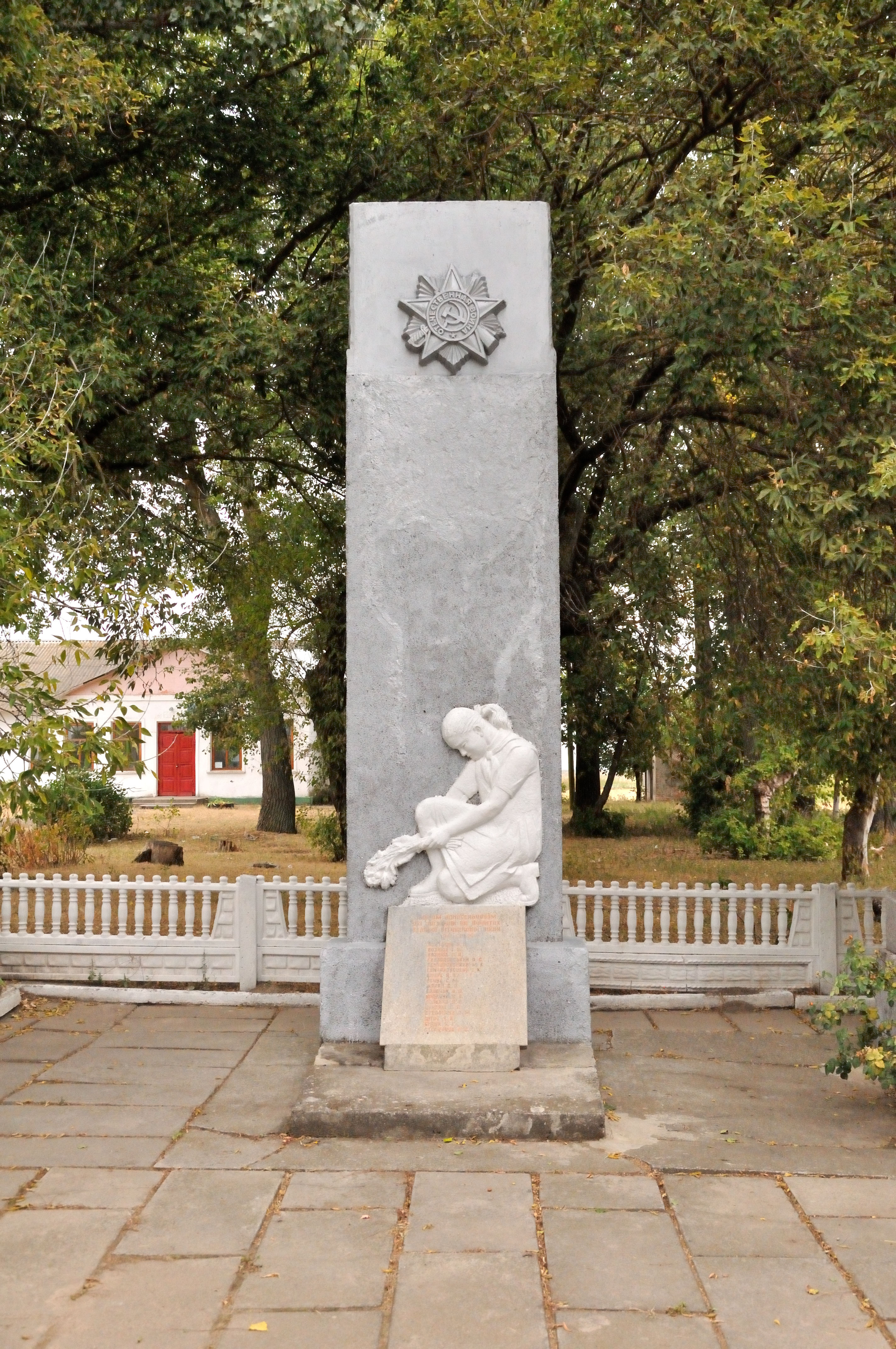 Пам’ятник воїнам-односельчанам, с. Дорогобуж